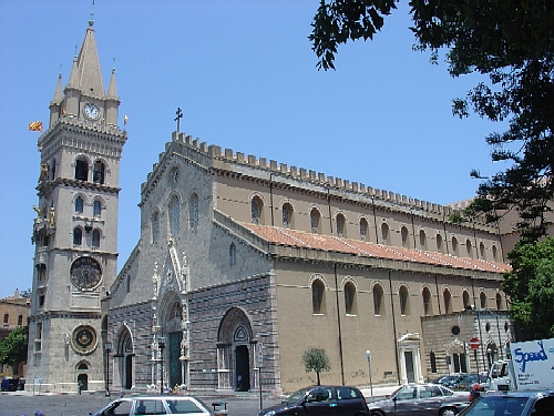 Der Duomo in Messina, Sizilien, Italien.